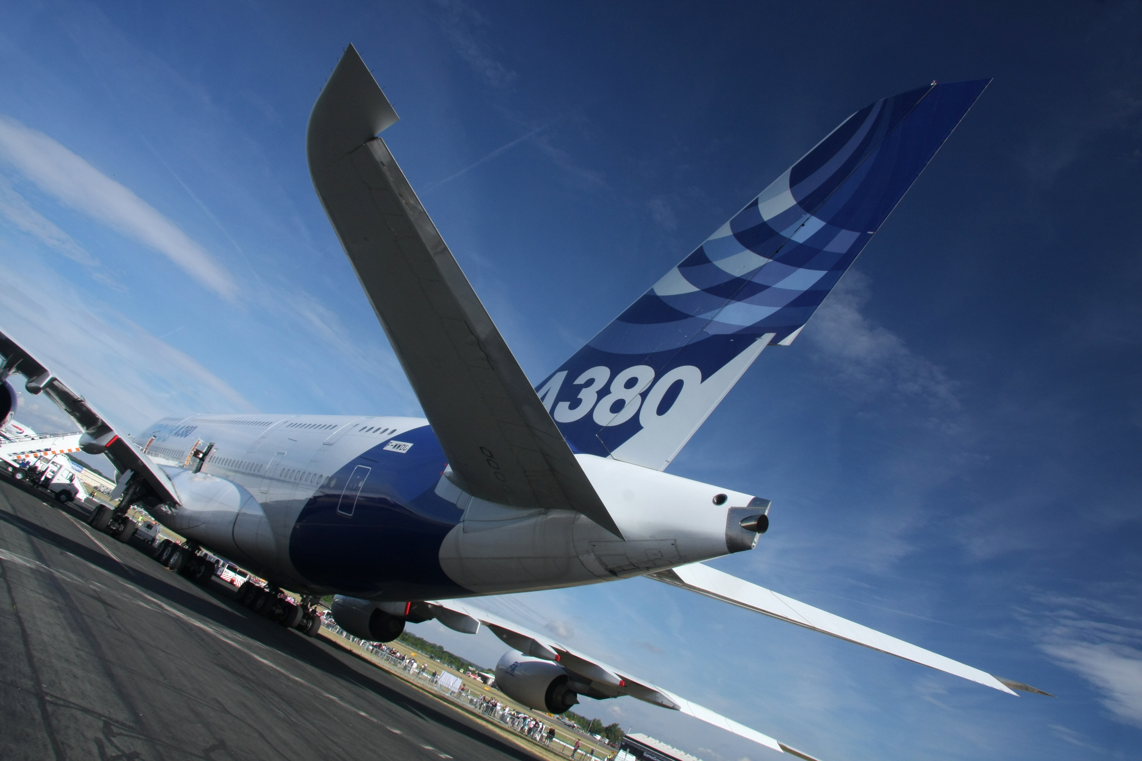 Airbus A380 01